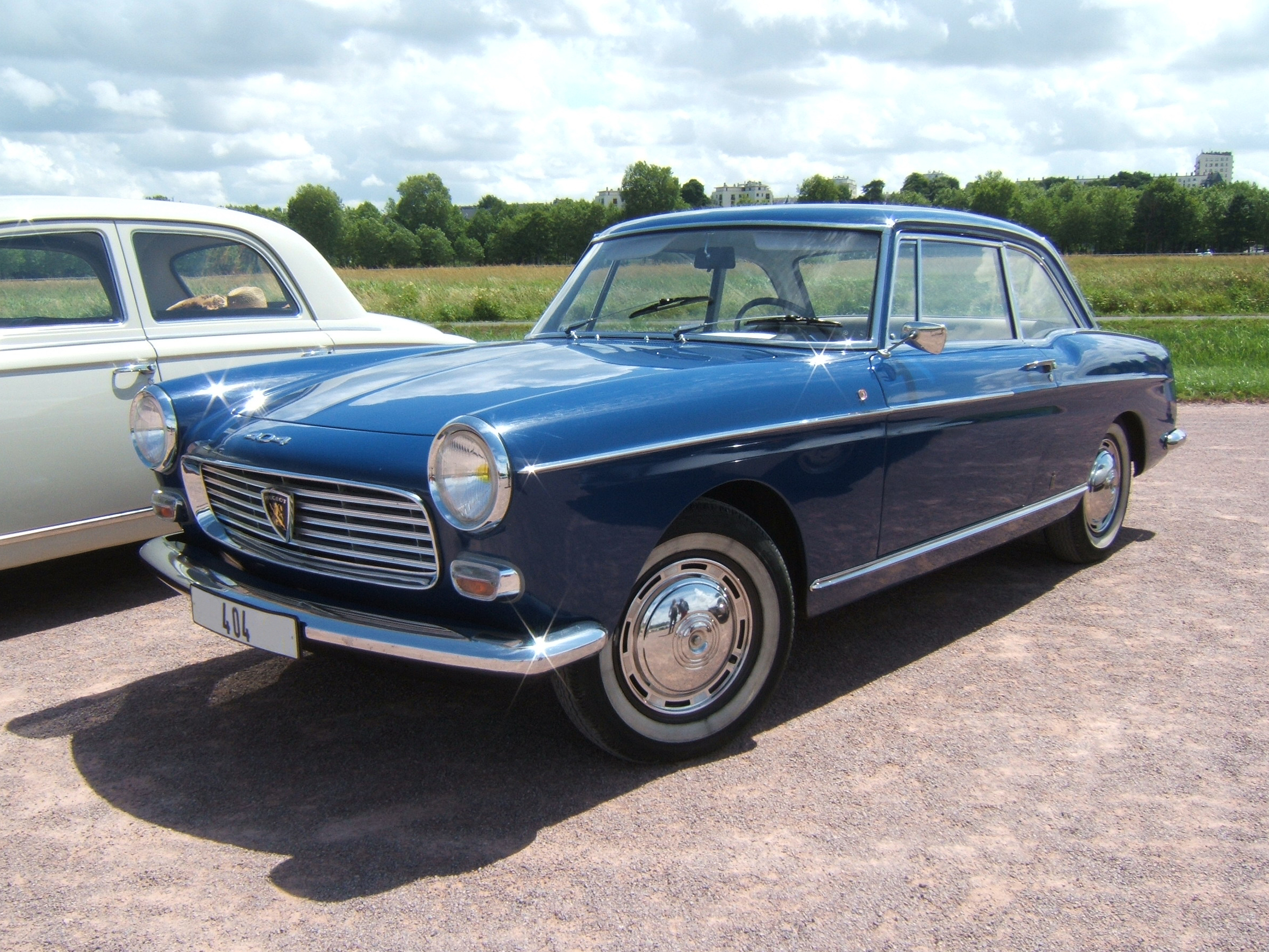 Peugeot 404 coupé, dessinée par Pininfarina.